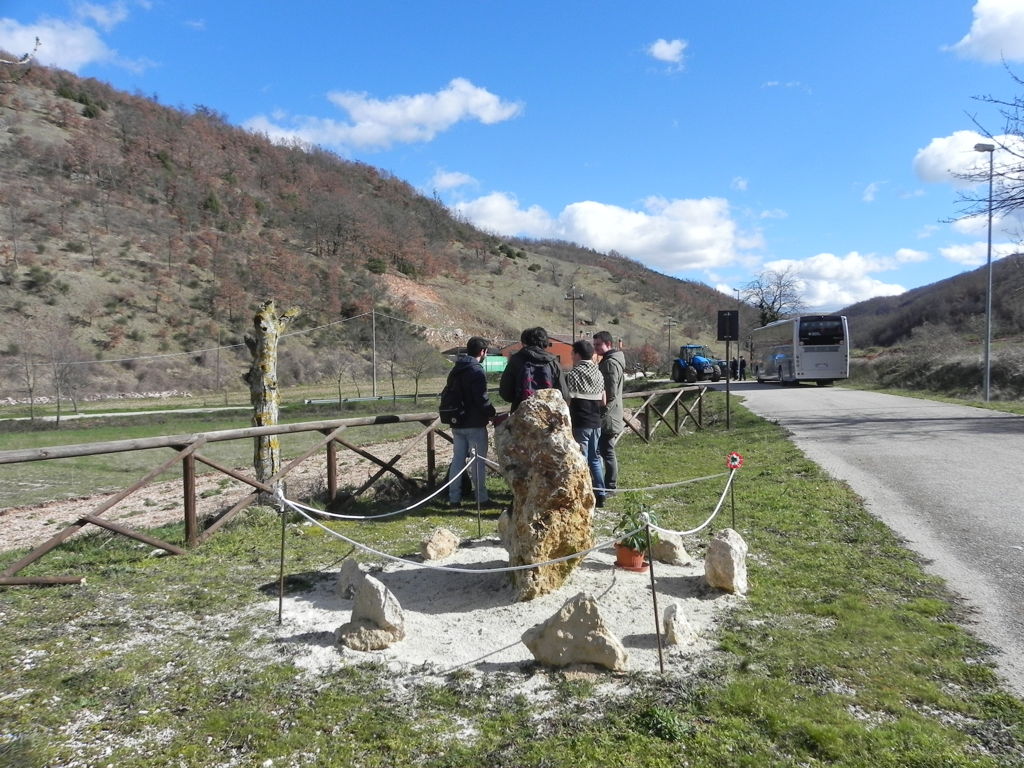 Laboratorio didattico